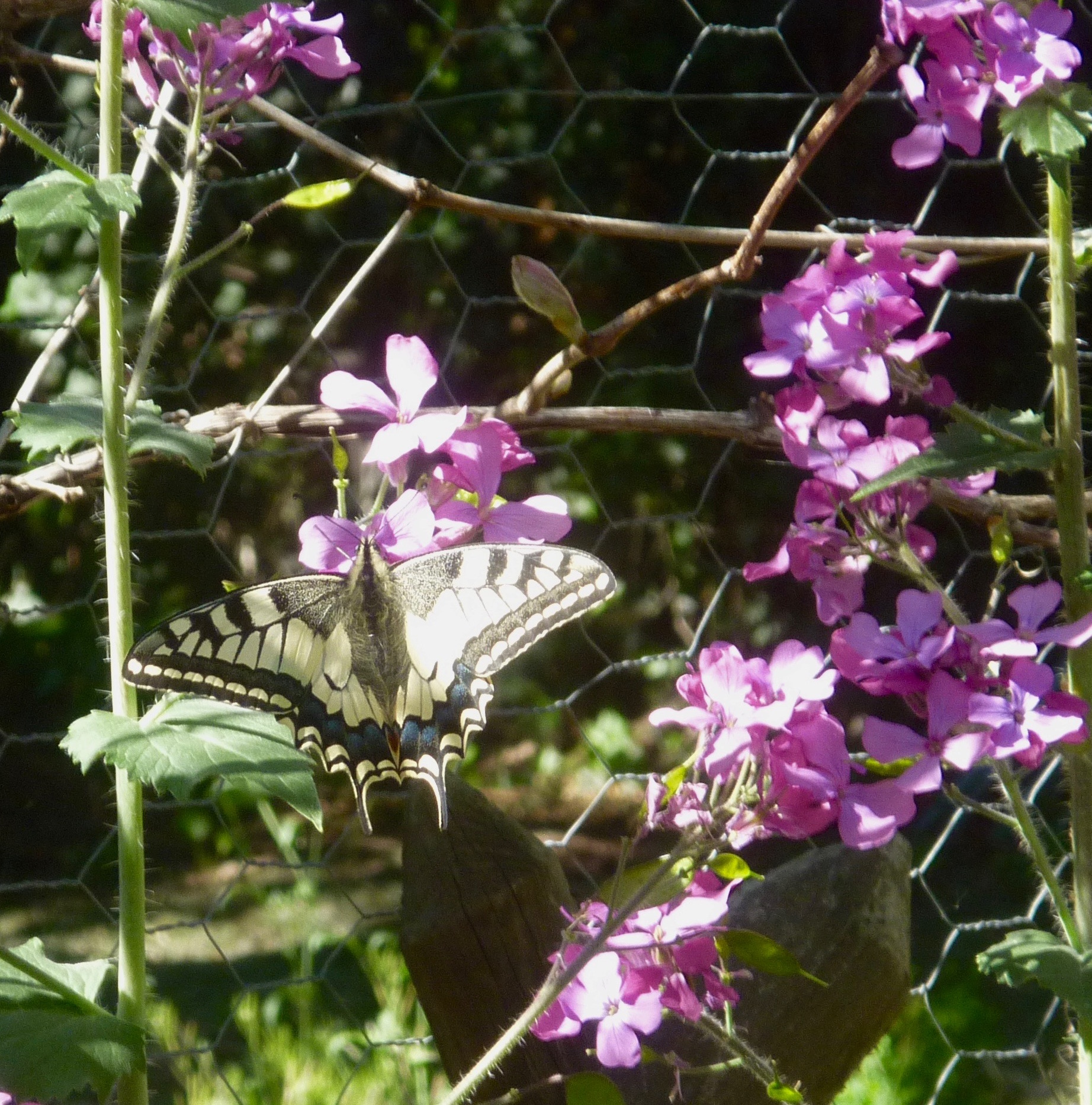 Machaon. Photo prise à Miramont-de-Comminges